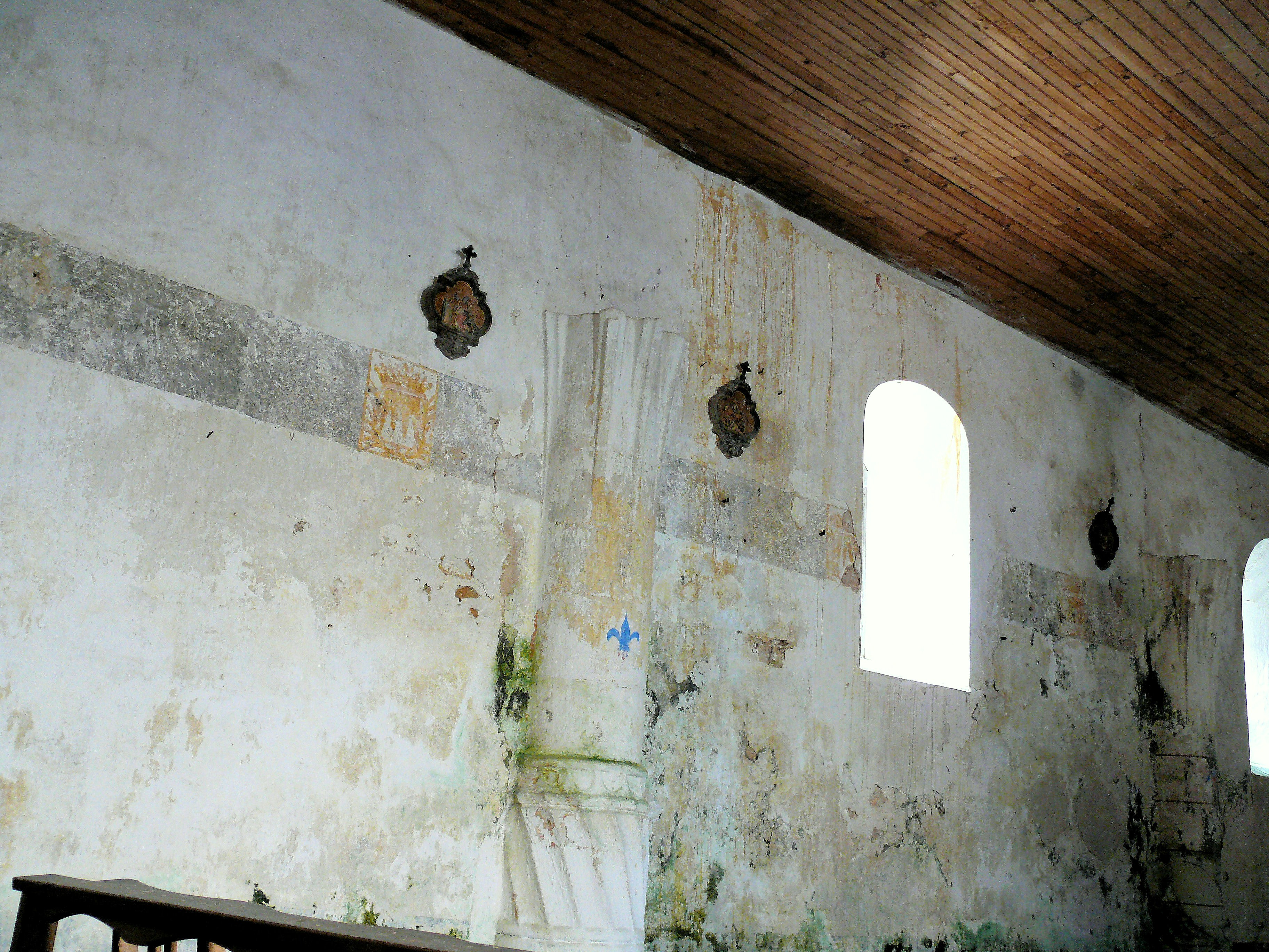 Paulhiac - Eglise de Bonnenouvelle - Colonne et litre funéraire aux armes des seigneurs de Fumel